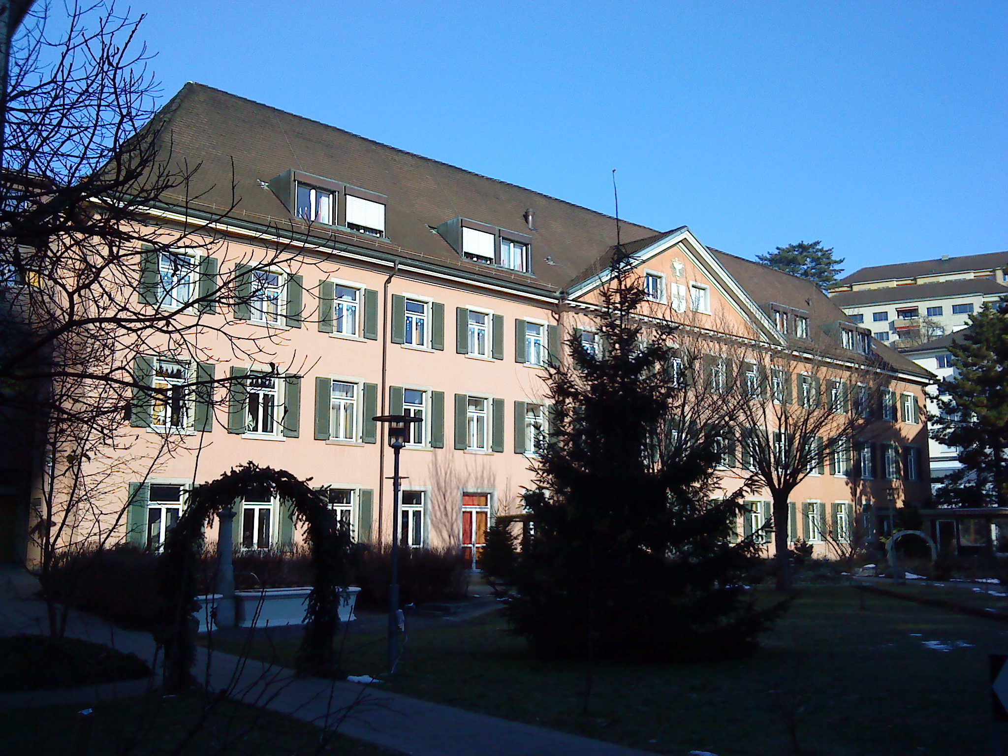 Altersheim am Kirchhofplatz, ehemals Kirche des Klosters Sankt Agnesen in Schaffhausen.